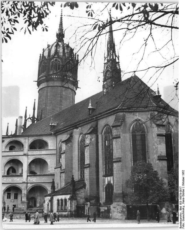 Wittenberg, Schlosskirche Zentralbild Quasch. 20.10.1952 Zur 450- Jahrfeier der Martin- Luther- Universität Halle-Wittenberg vom 18. bis 25.10.1952 Während der Festwoche haben die auswärtigen Gäste die Gelegenheit, die historischen Stätten der alten Lutherstadt Wittenberg zu besichtigen. UBz: Blick auf die Schloßkirche zu Wittenberg. erbaut 1490 - 1499. 1502 wurde die Universitätskirche und von 1885 bis 1892 wurde sie zur Reformations-Gedächtniskirche umgebaut. Sie beherbergt die Gräber von Luther und Melanchthon. [2-teiliges Panorama]